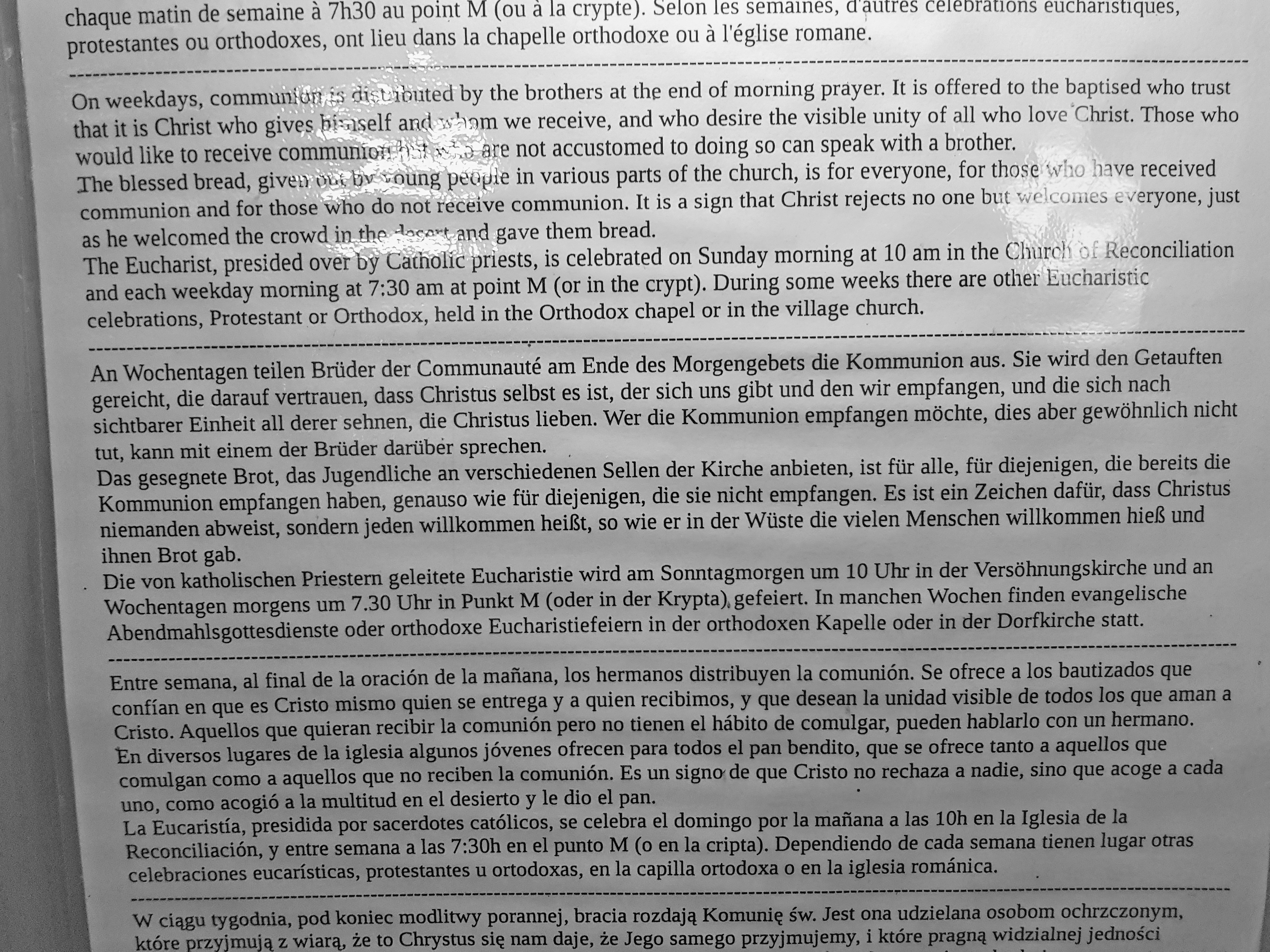 Schild in der Kirche: Kommunion in Taizé